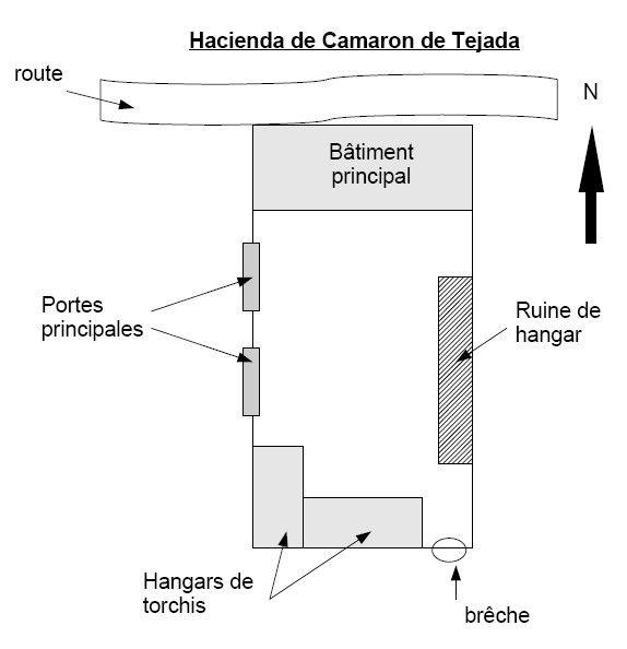 dessin de l'hacienda de Camerone